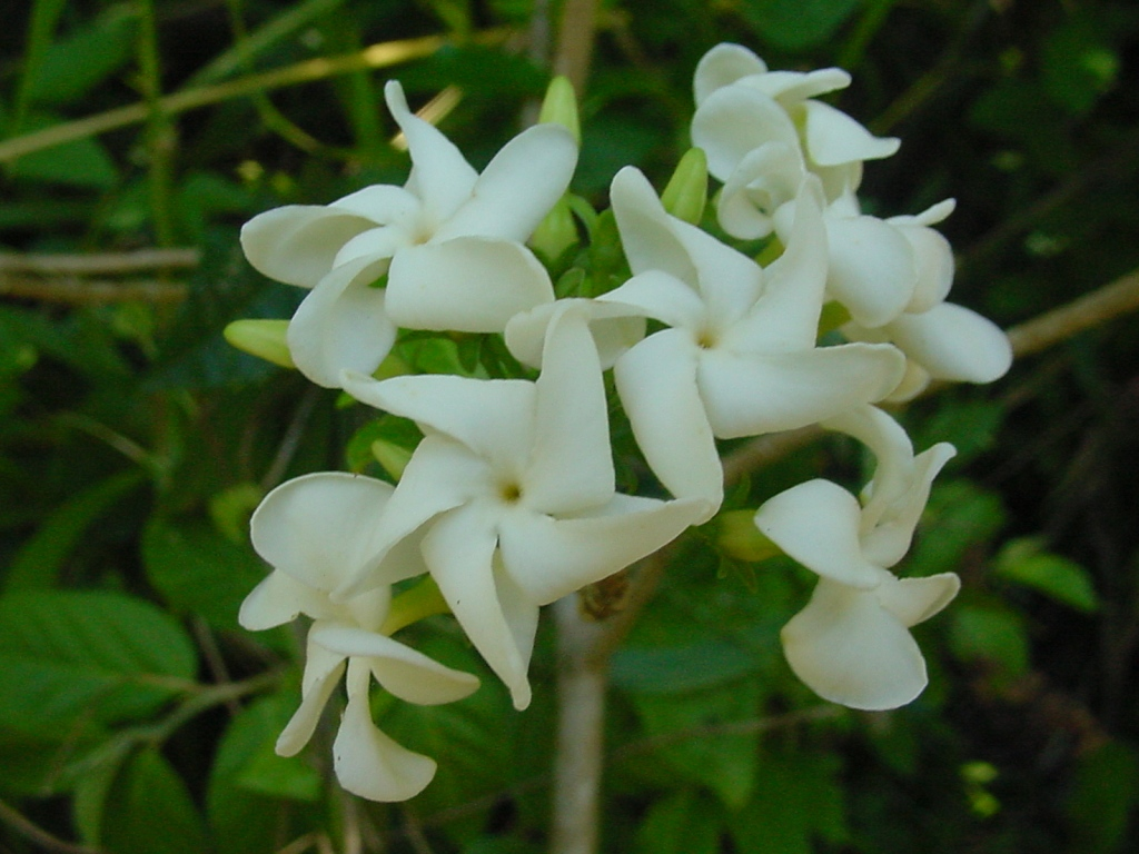 Tabernaemontana catharinensis - APOCYNACEAE - Imbituba - SC ? Brasil